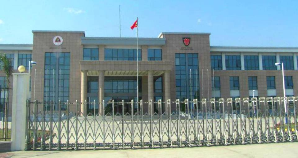 Dili